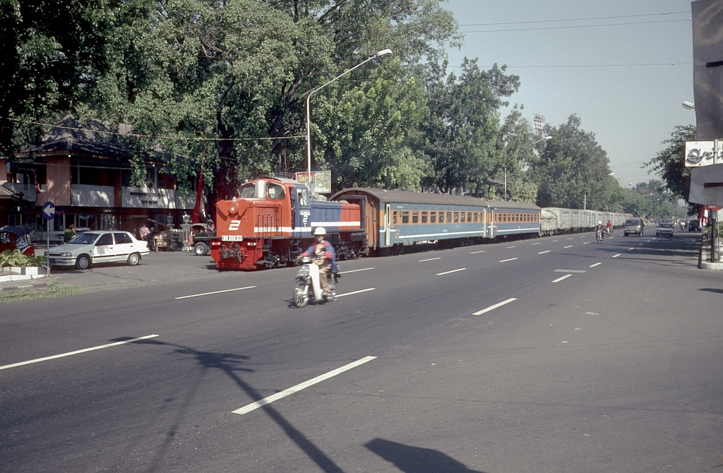 PTKABB300 (300 03 A)